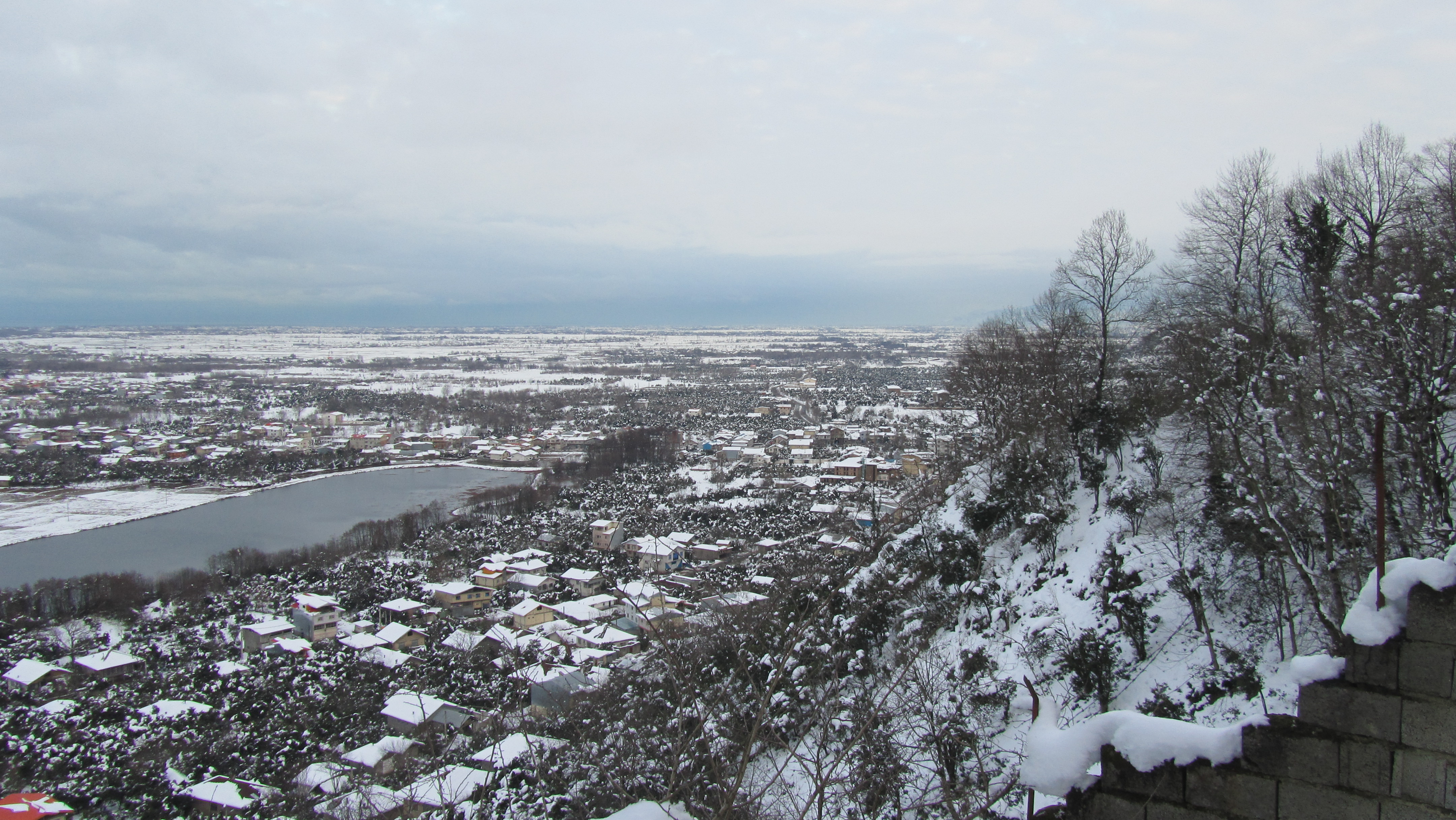 برف زیبا